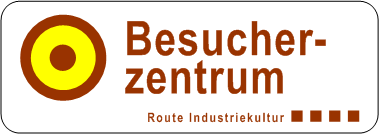 Infosymbol Besucherzentrum der Route der Industriekultur